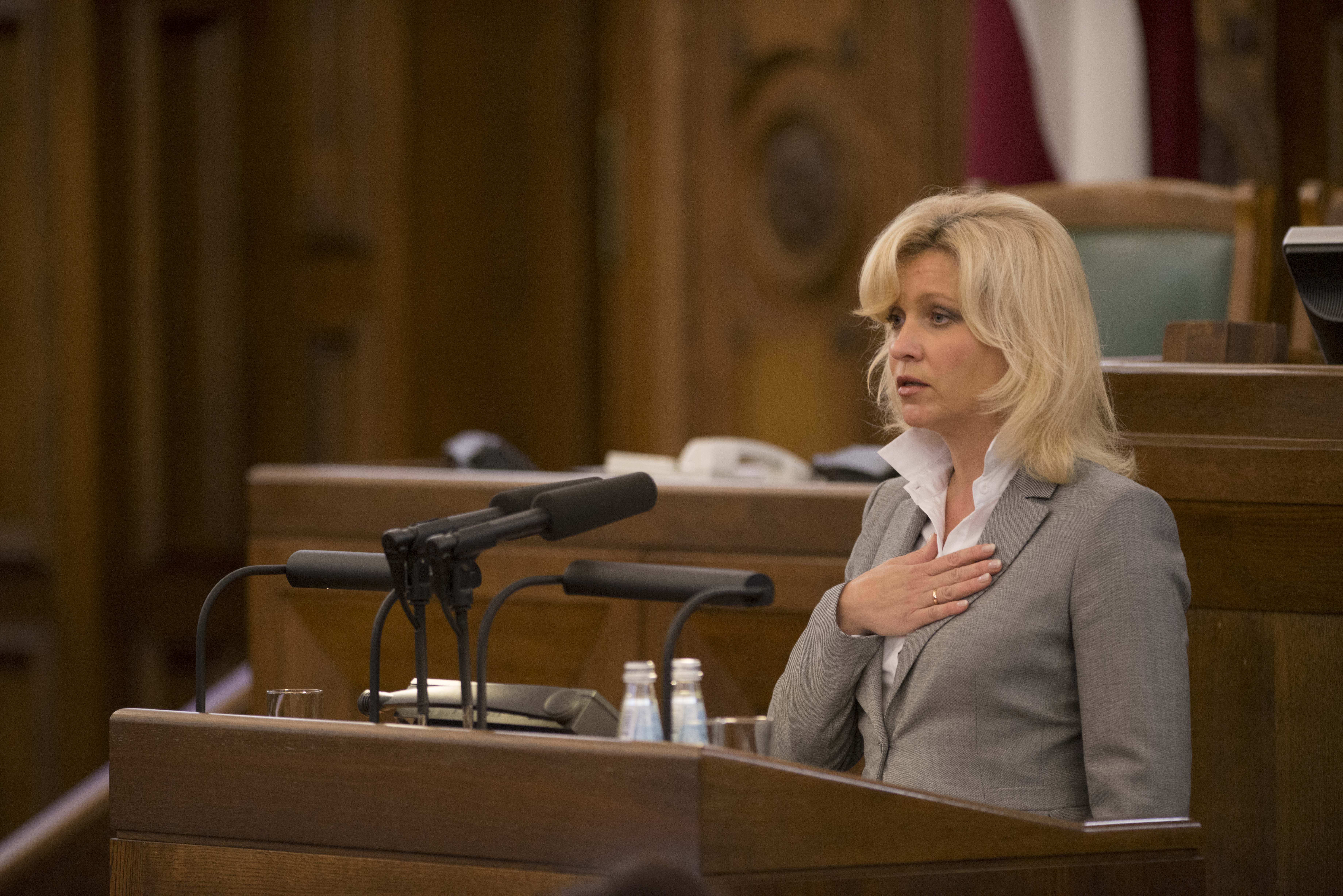 2014.gada 4.novembris. Deputāte Regīna Ločmele-Luņova dod svinīgo solījumu. Foto: Juris Vīgulis, Saeimas Kanceleja Izmantošanas noteikumi: saeima.lv/lv/autortiesibas